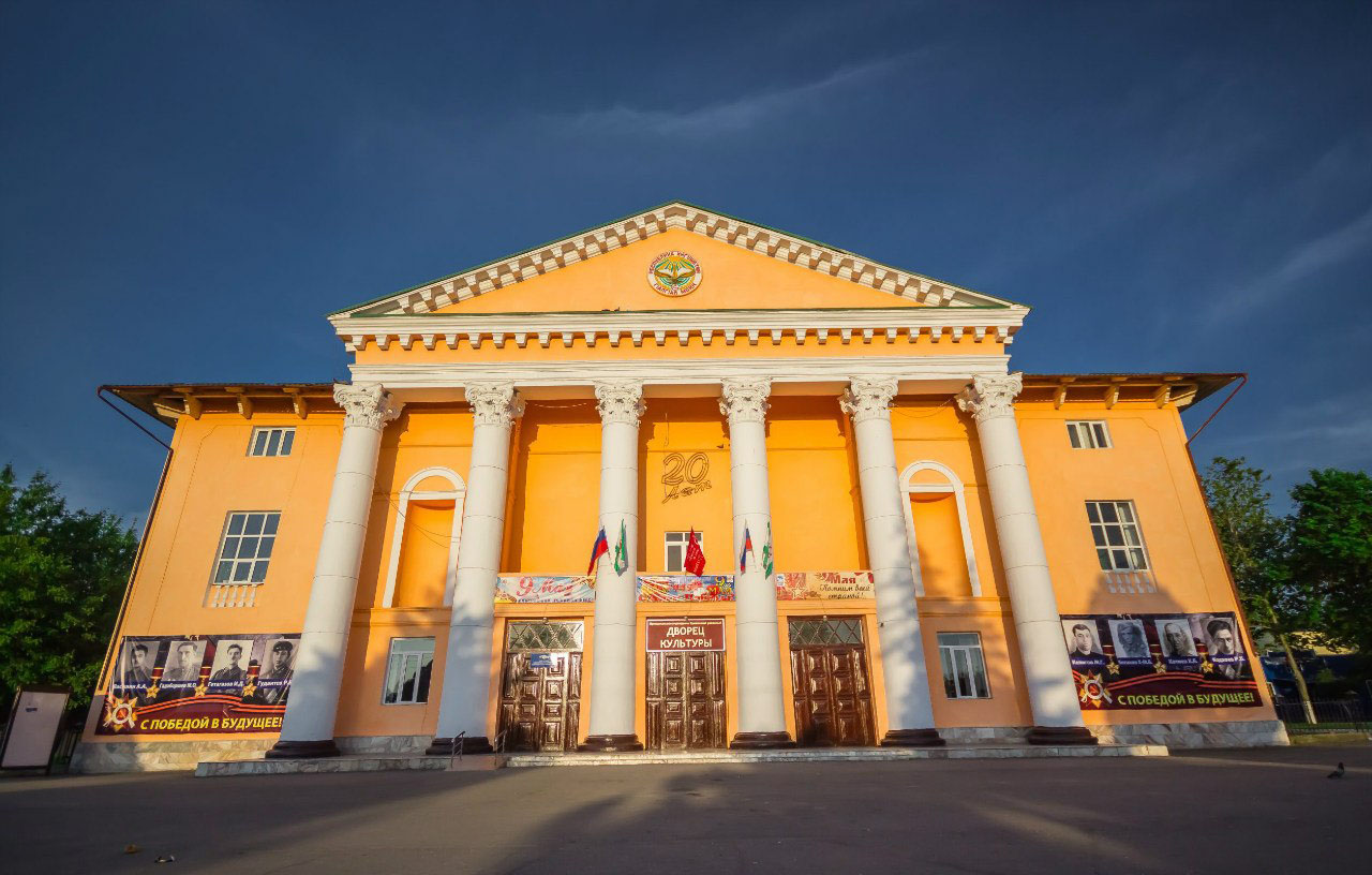 Дворец Культуры города Сунжи Республики Ингушетия